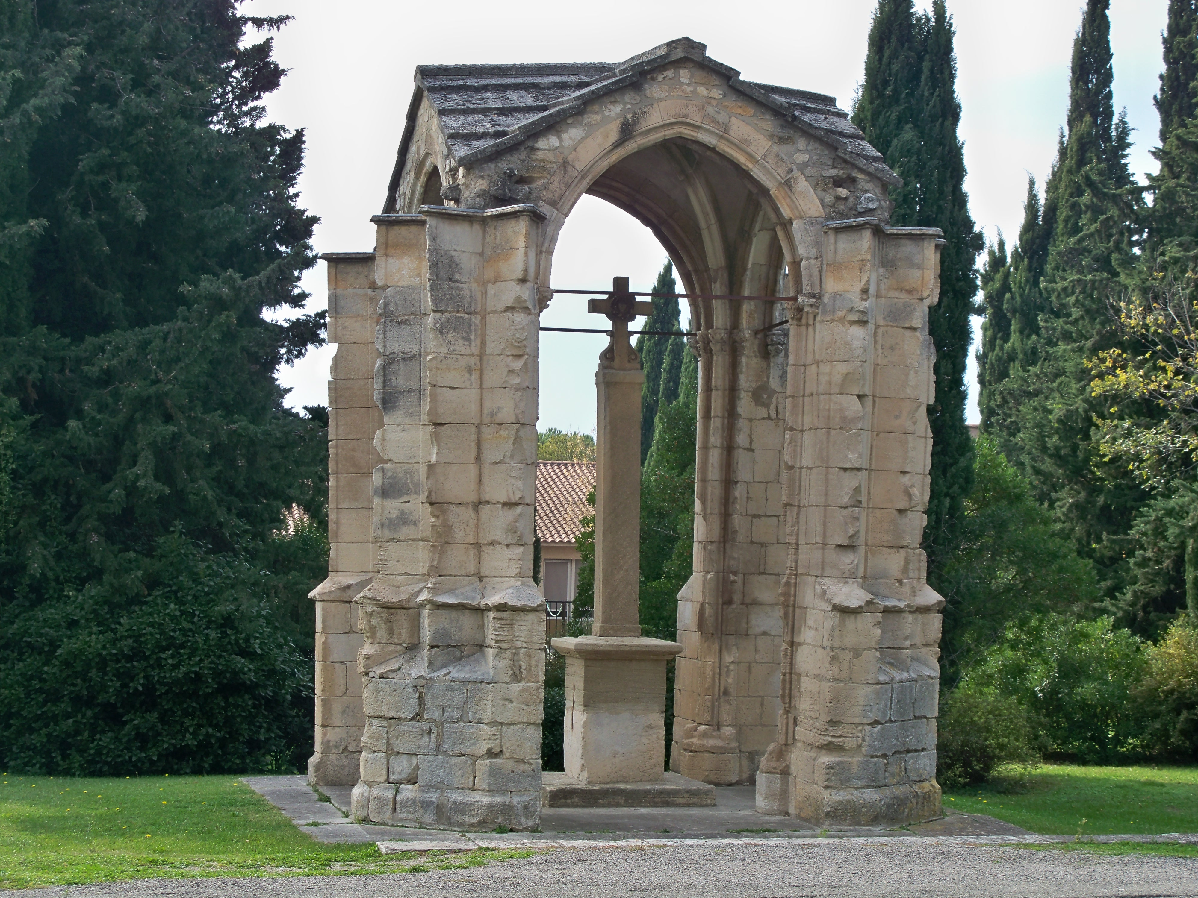 Croix couverte à Pernes les Fontaines, Vaucluse, France